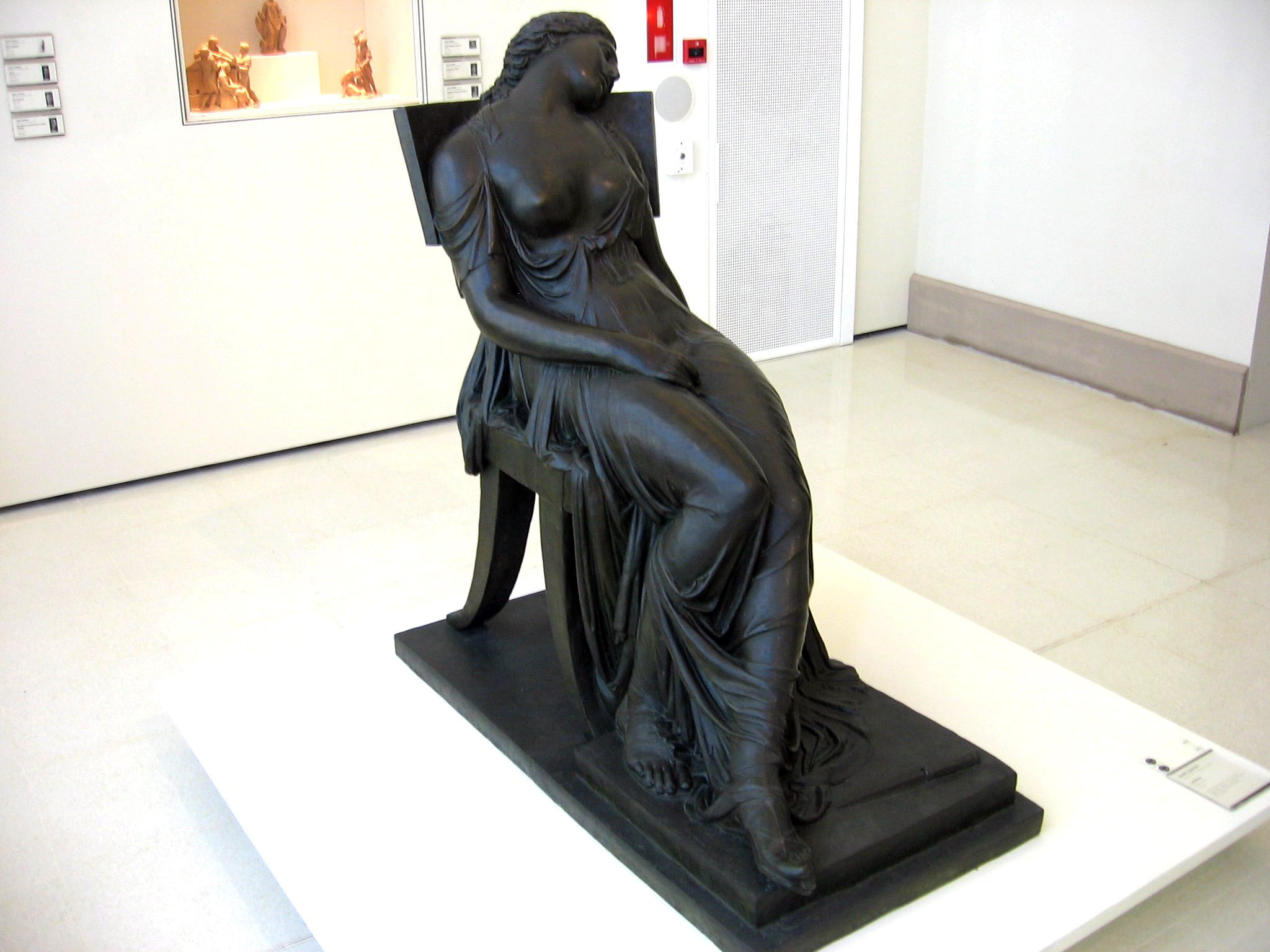 Damià Campeny, Lucrecia, 1803, MNAC (Barcelona).